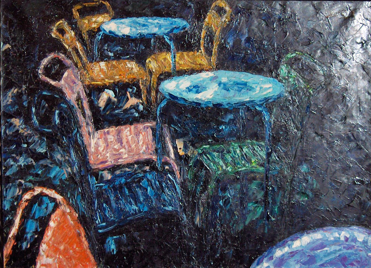 "Avondschemering" - olie op doek (1958)